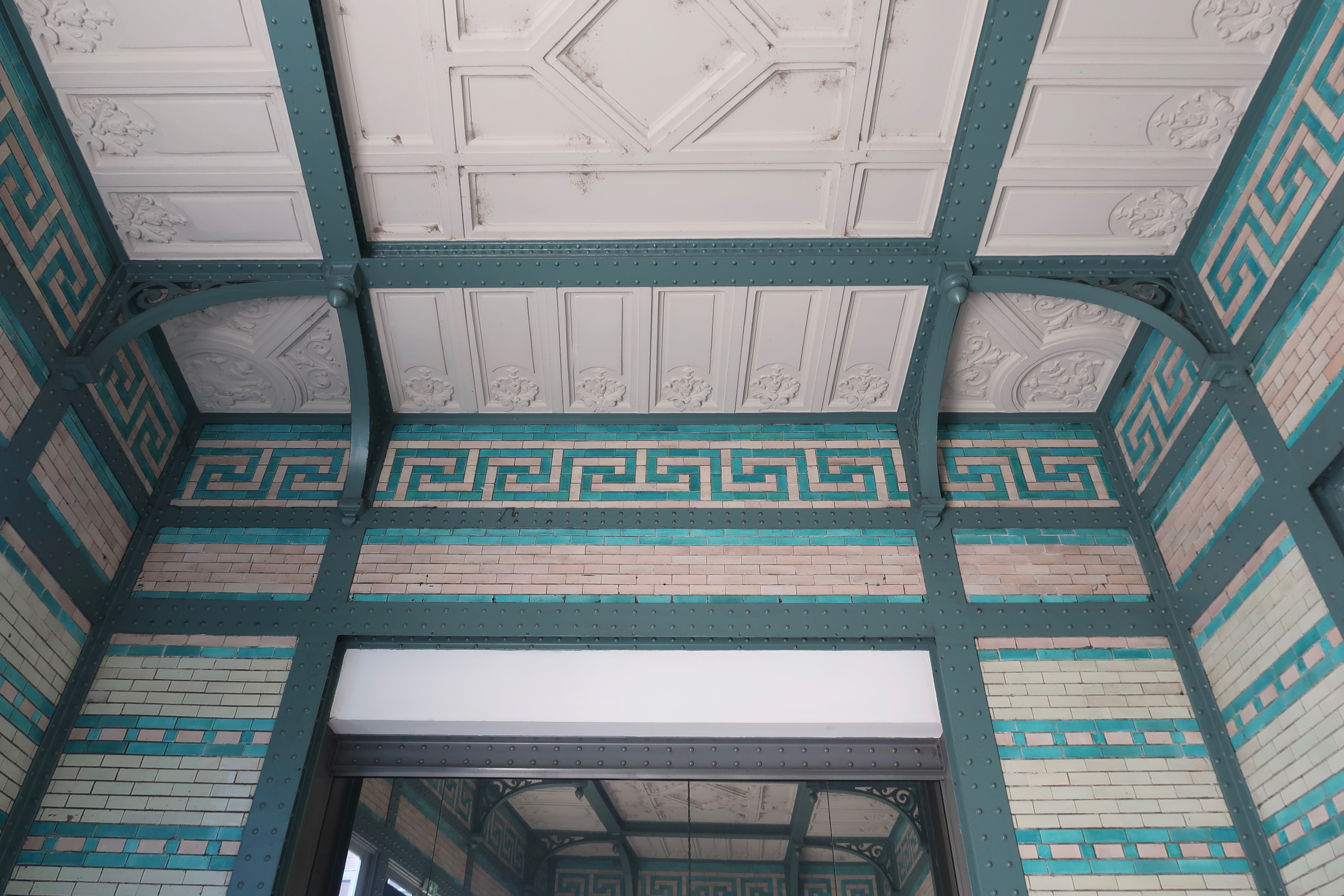 Plafond de la gare de Javel (Paris, 15e).